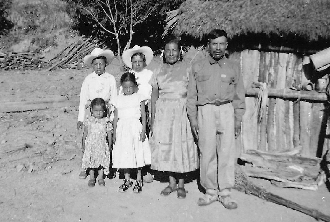 Familia campesina, San Juan Achiutla, Oaxaca, México, 1945